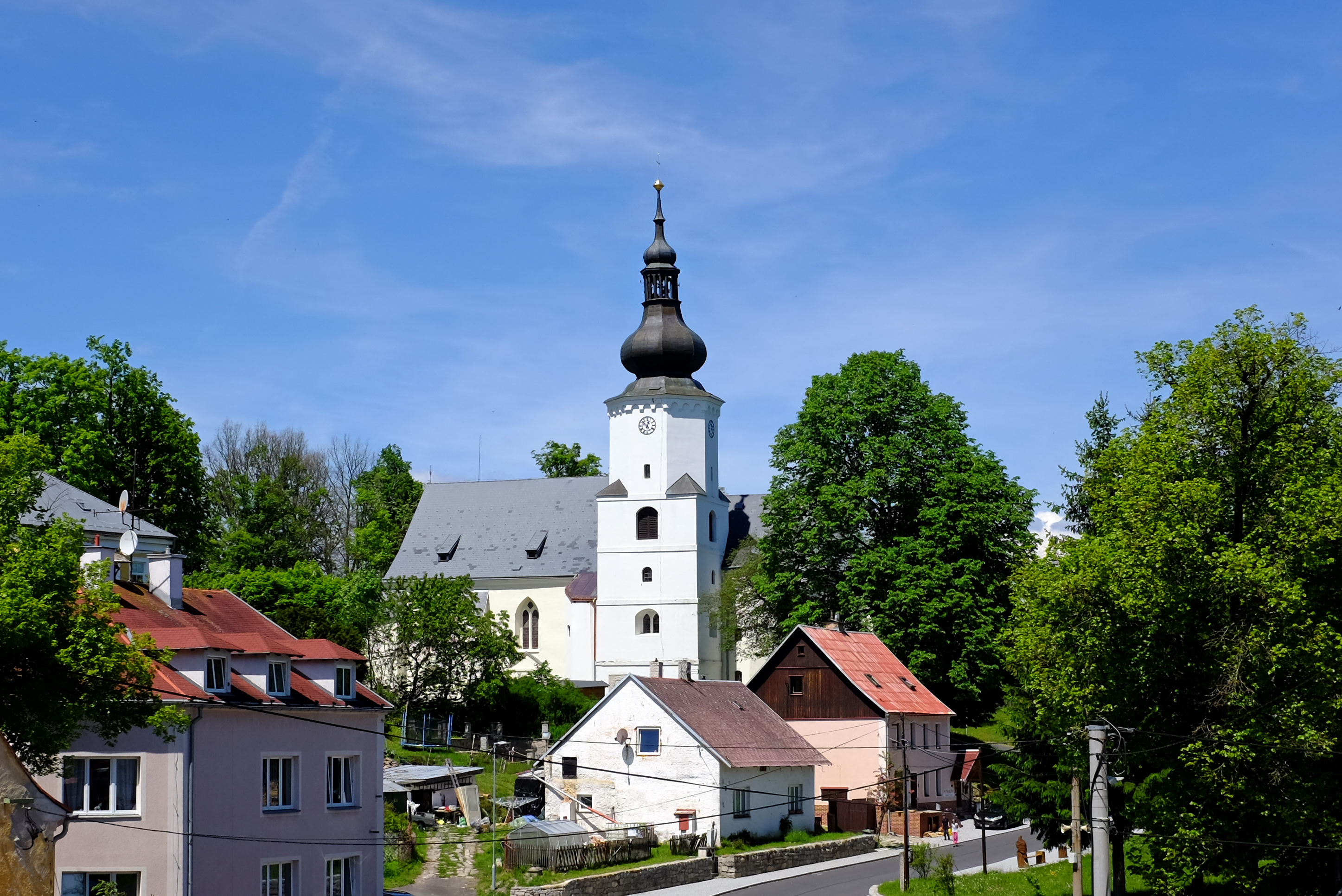 Kostel svatého Martina, Jindřichovice (okres Sokolov).